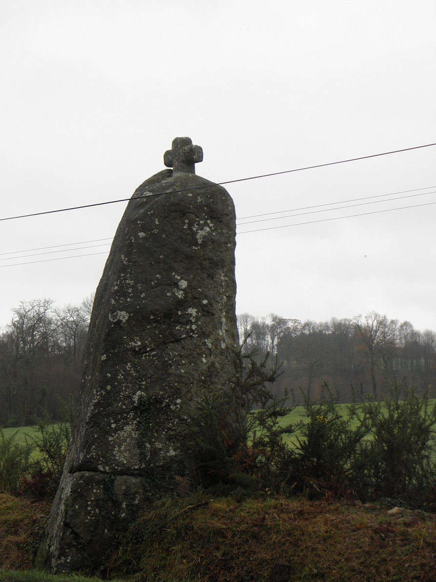 Menhir de Landes-Ros ou de la Pierre Longue en Noyal-sous-Bazouges (35).